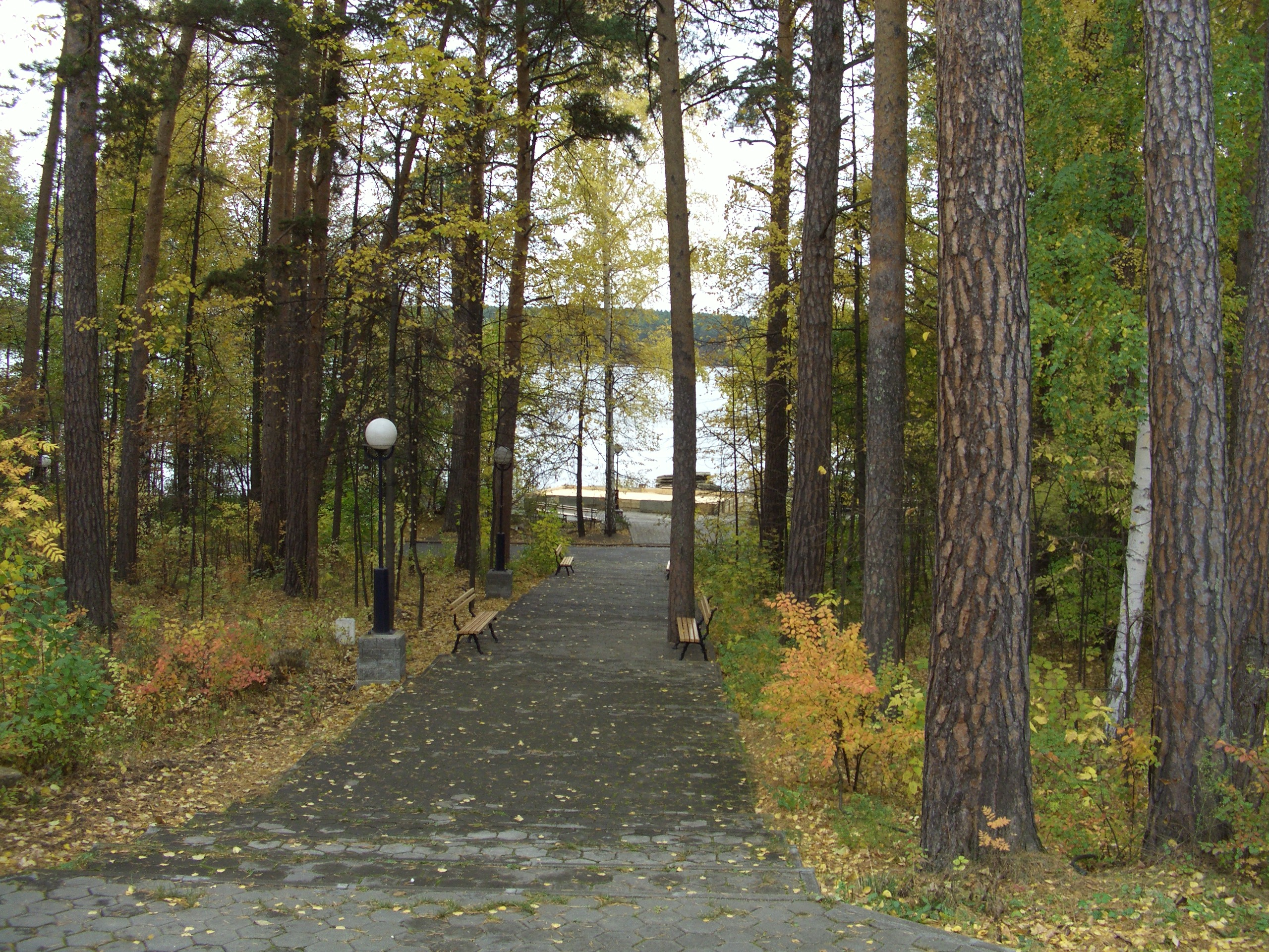 Спуск к оз. Теренкуль